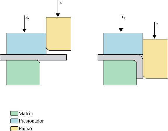 analisis doblado bordes